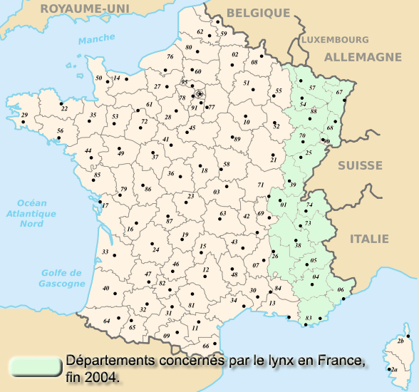 départements concernés par le Lynx en France fin 2004.